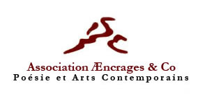 Logo des éditions Æncrages & Co